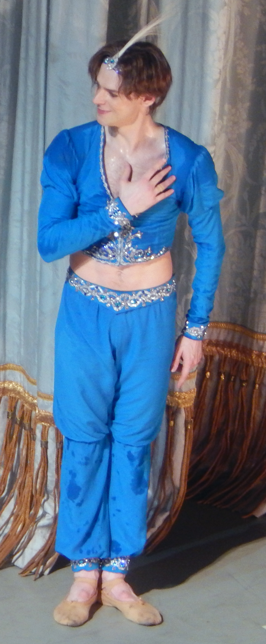 Мариинский театр, балет «Баядерка», 18 мая 2017 Владимир Шкляров (справа) в роли Солора